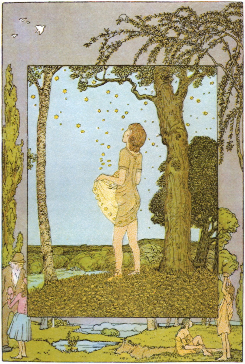 Illustration des Grimm'schen Märchens „Die Sterntaler“ (KHM 153) von Heinrich Vogeler